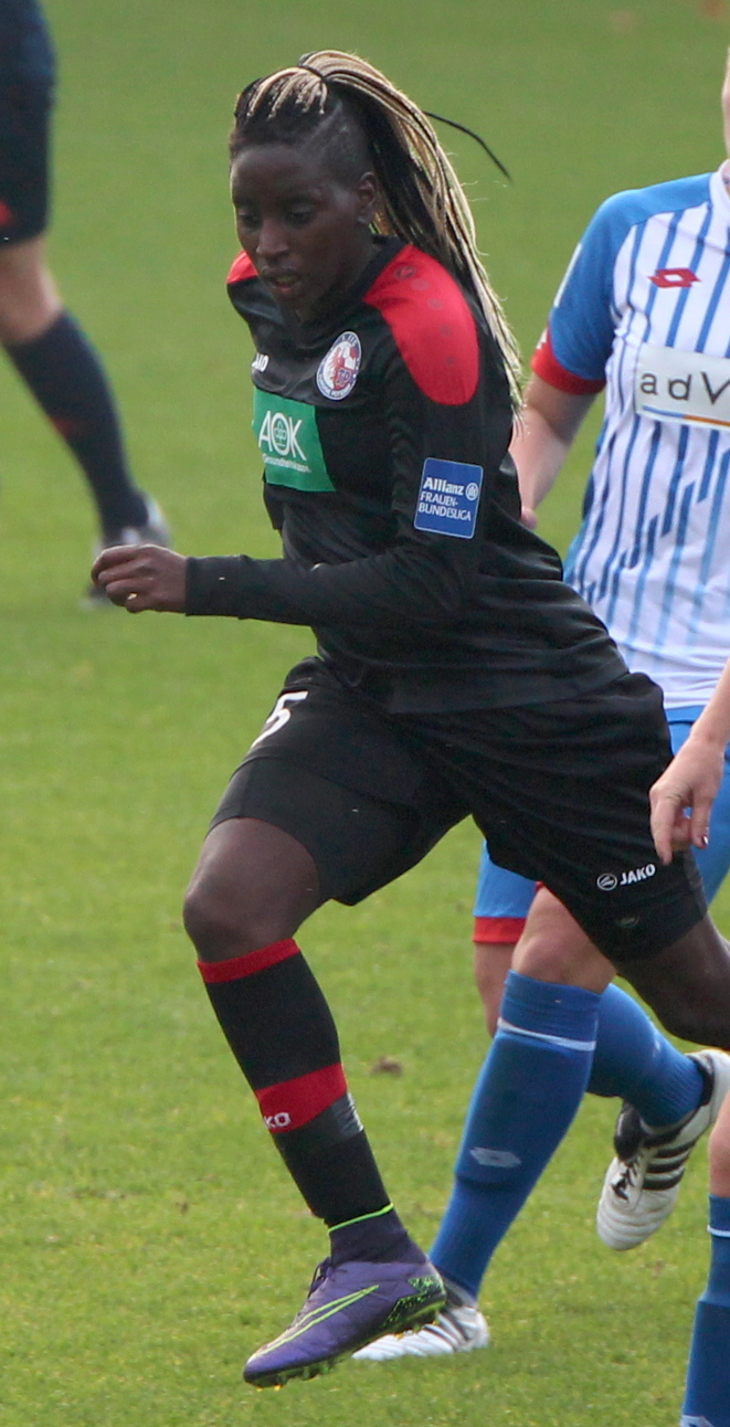 Marina Makanza